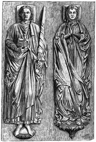 Heinrich der Löwe und seine Gemahlin Mathilde, Deckplatte ihres Grabmales im Braunschweiger Dom, Abbildung aus Dr. Paul Knötel, Bildatlas der Deutschen Geschichte, Bielefeld und Leipzig, 1895